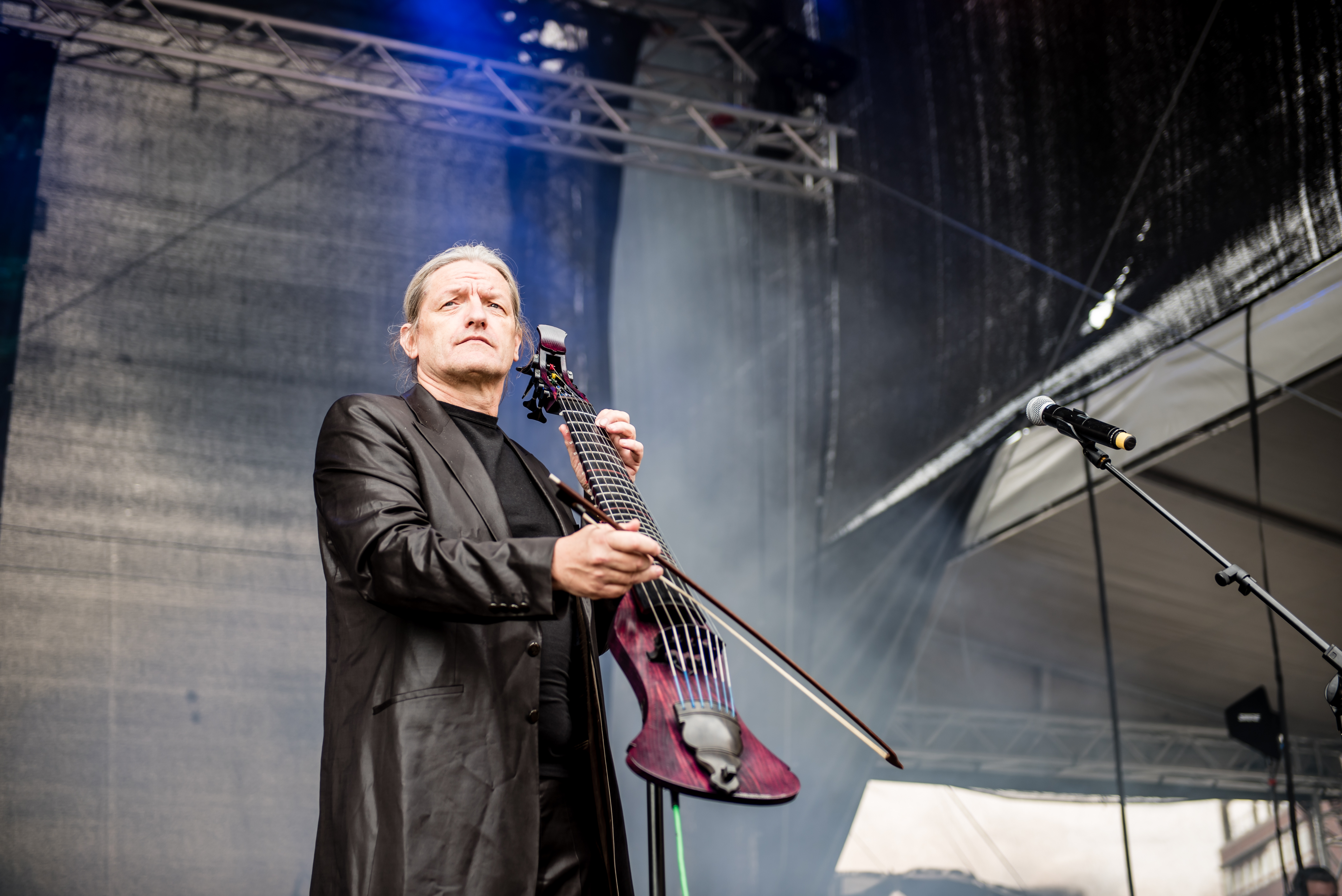 'Amphi Festival 2015; Köln - Lanxess Arena': 'Qntal'